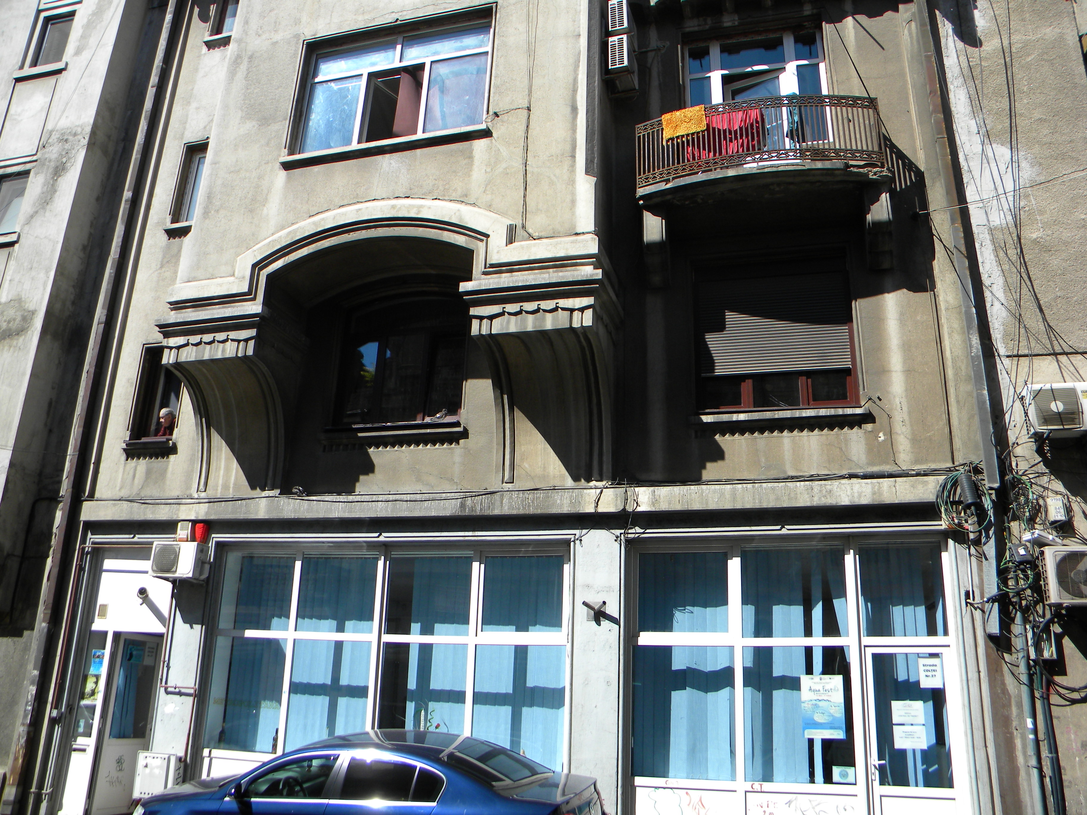 Bucuresti, Romania, Imobil pe Str. Coltei nr. 27, sector 3